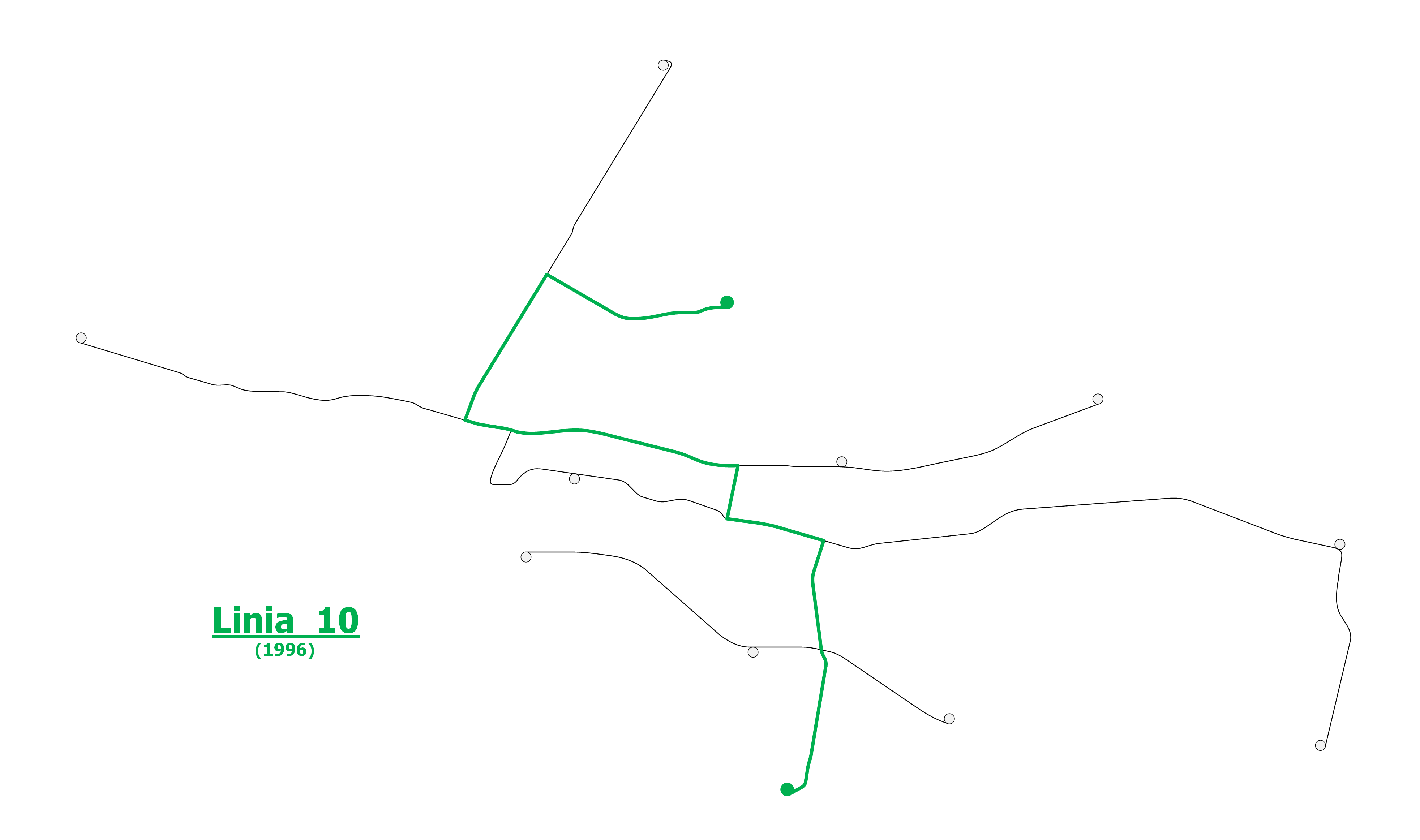 Schemat linii tramwajowej 10 w Bydgoszczy (w roku 1996).